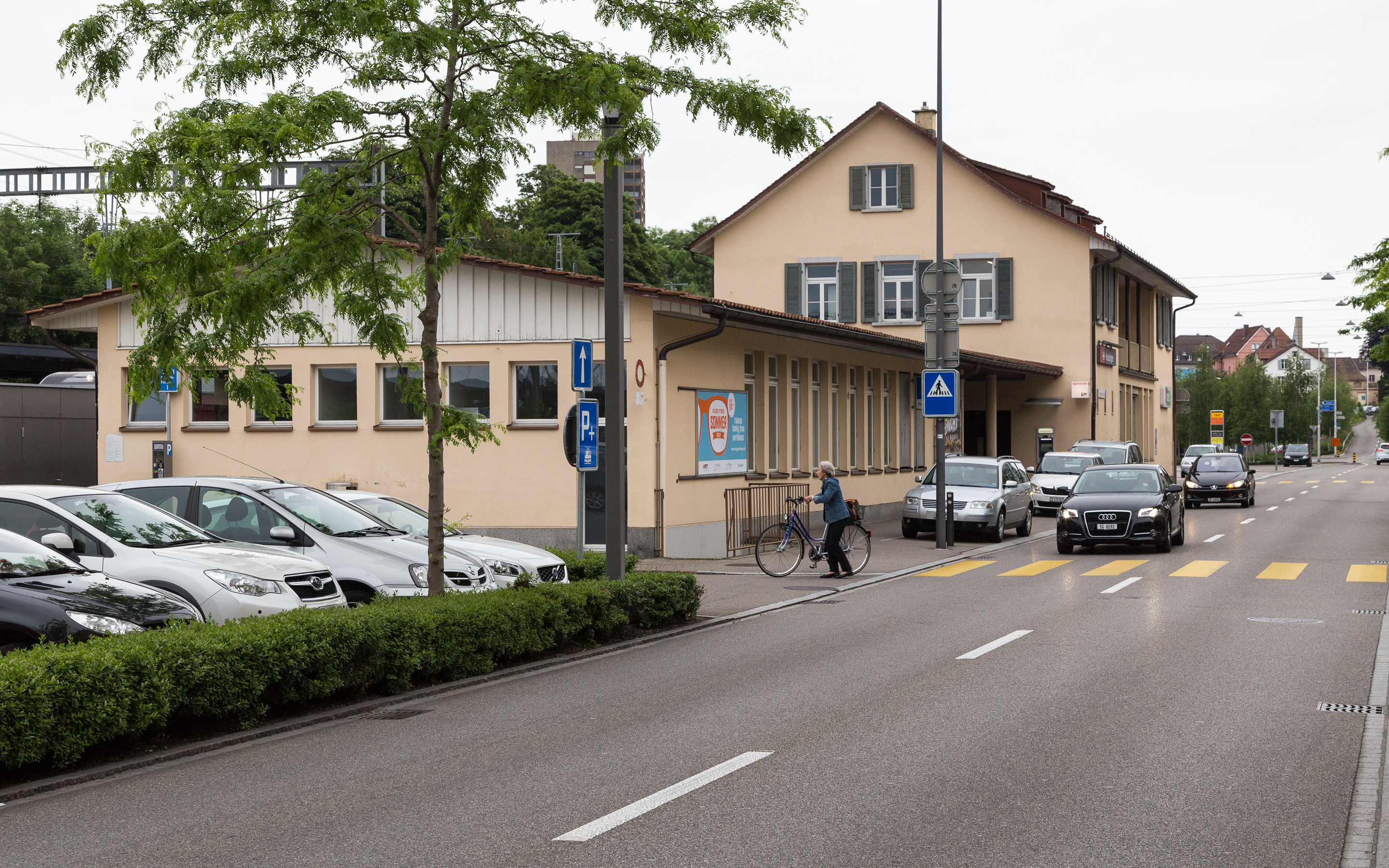 Bahnhof Kreuzlingen, Westseite (2016)